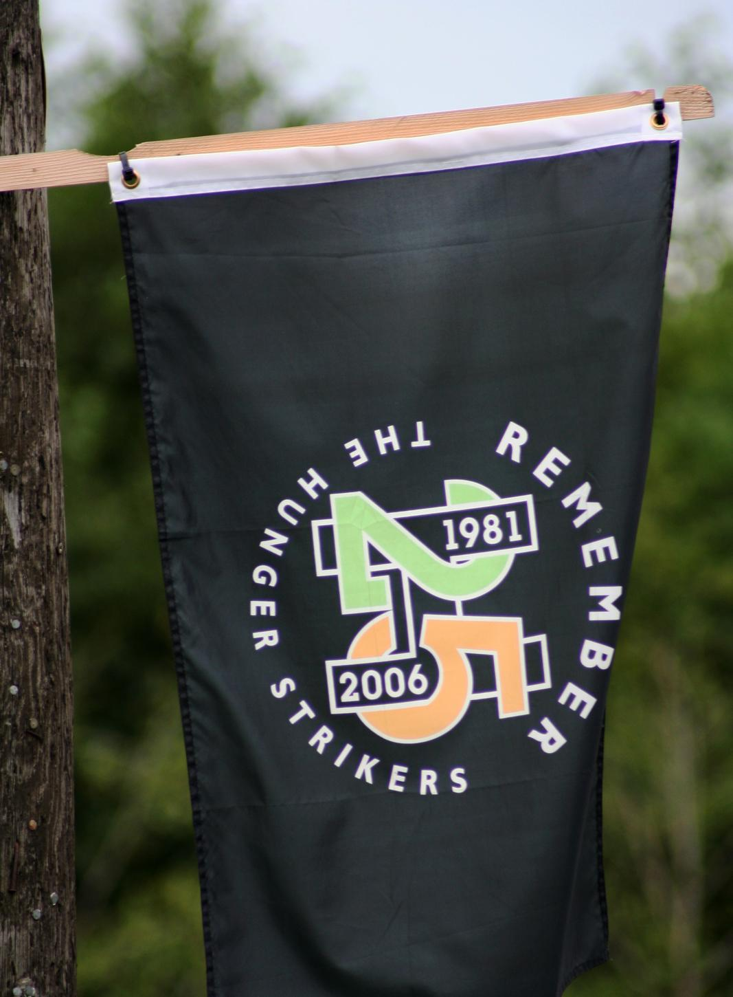 Hunger strike flag in Kilnaleck, Cavan